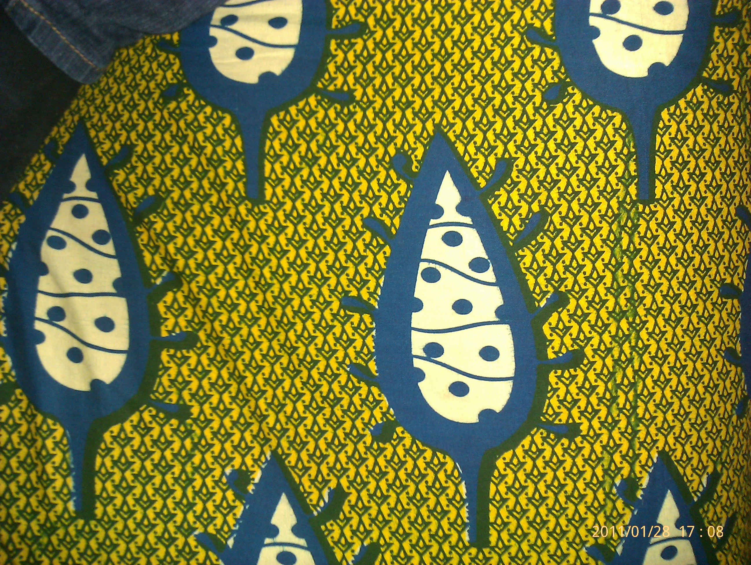 Tissu anglais, wax à motif type feuilles